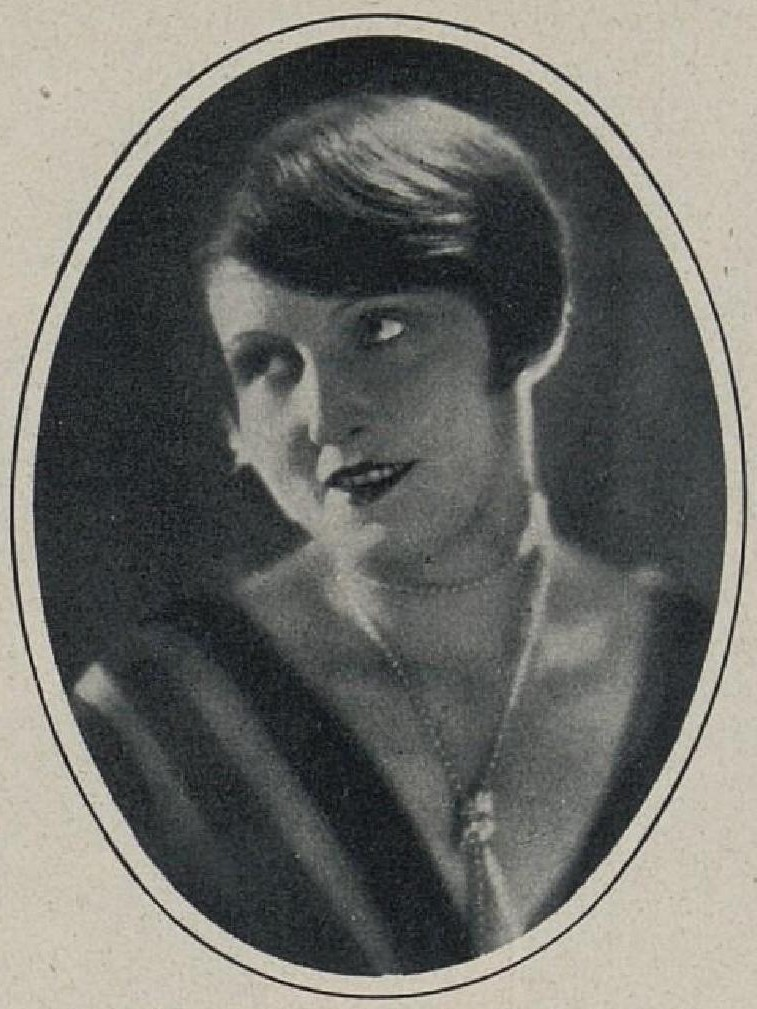 Suzanne Marwille (1895-1962), česká herečka